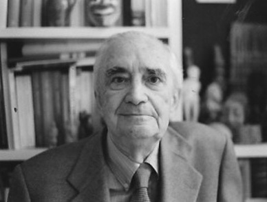 il regista di cinema scientifico Virgilio Tosi